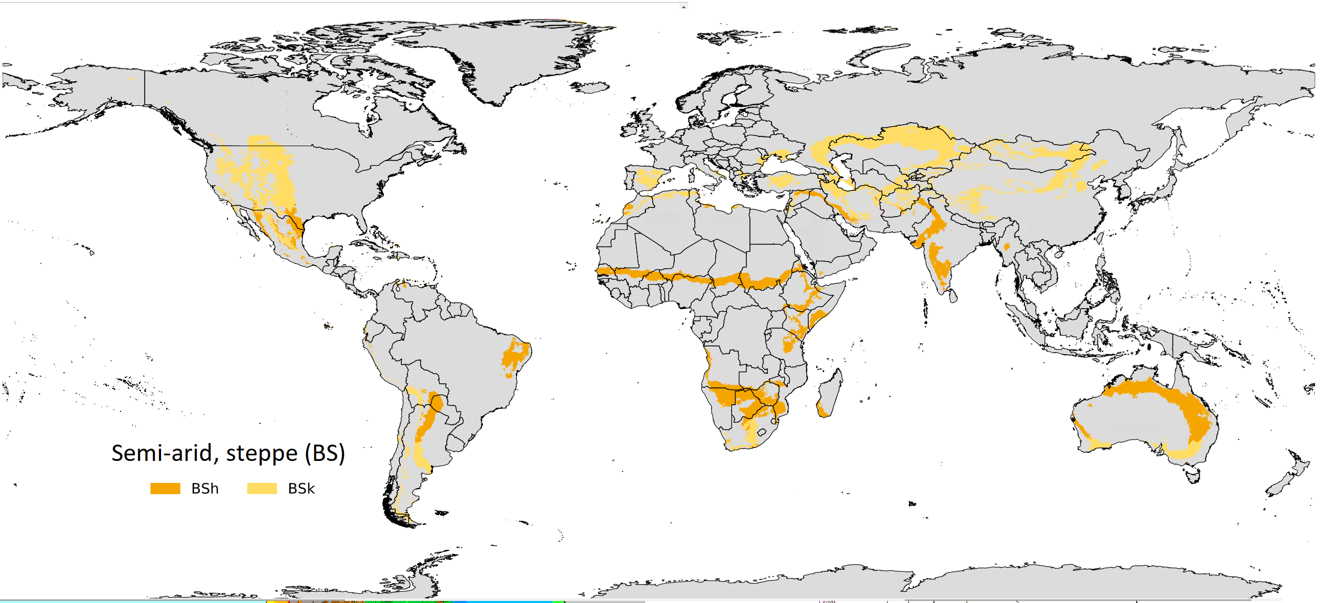 Mapa global del clima semiárido o de estepa BS de acuerdo al sistema de Köppen-Geiger para el periodo 1980-2016